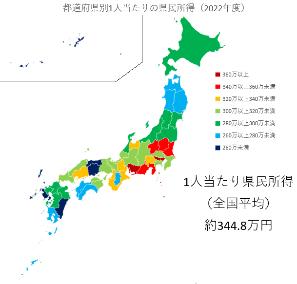 2016年度の一人当たりの県民所得